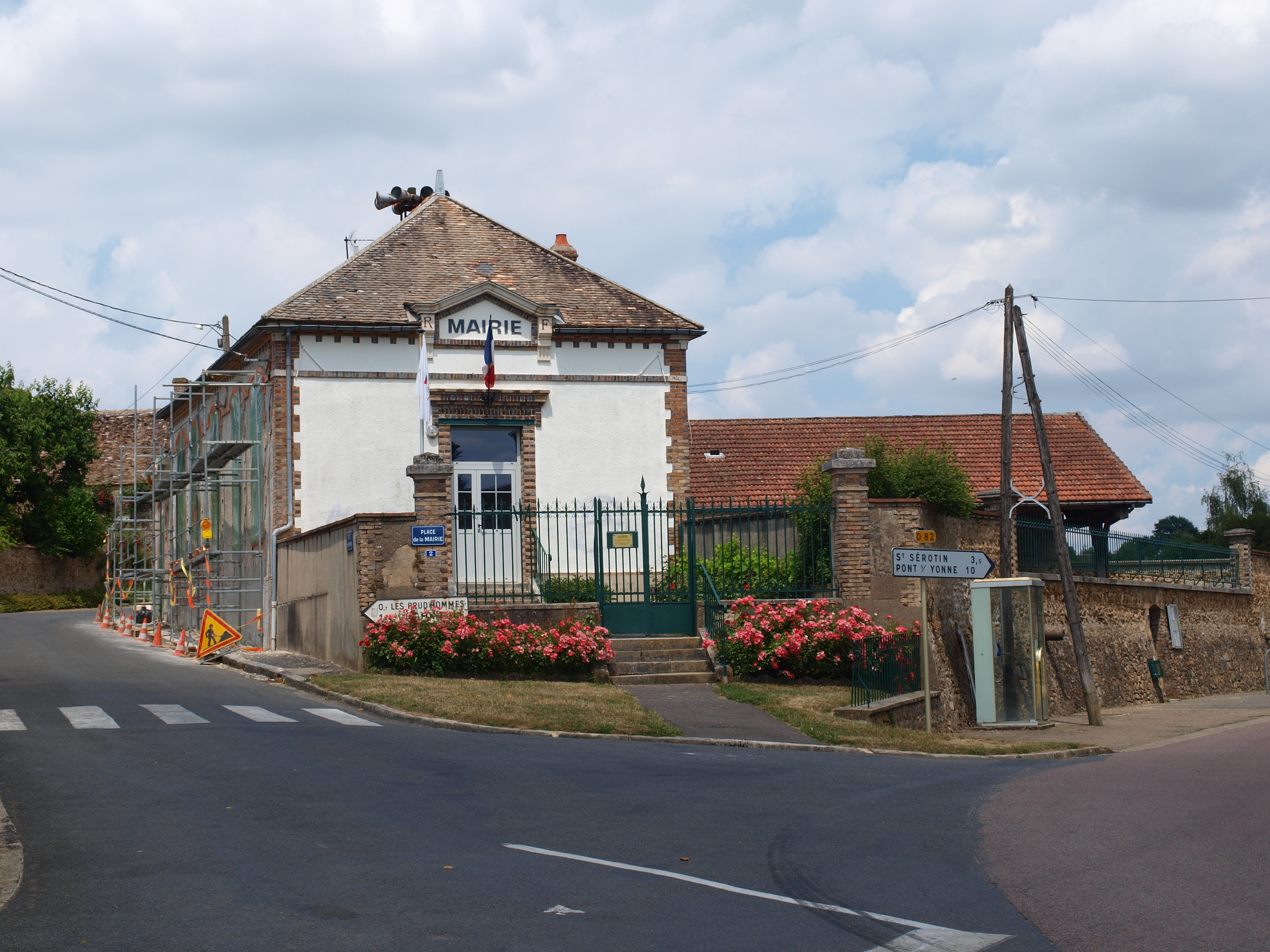 Brannay (Yonne, France)